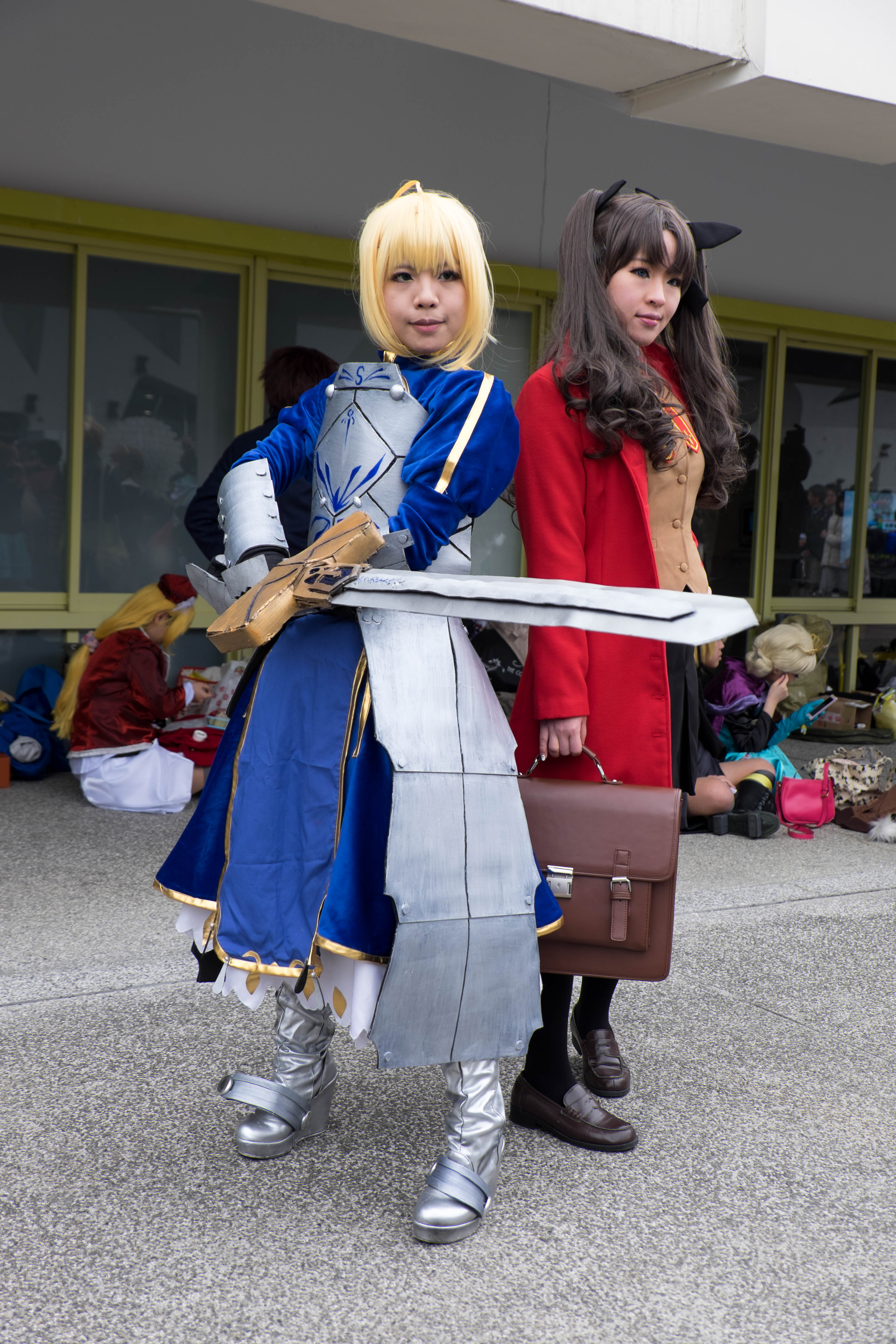 Fancy Frontier 25第一日下午，《Fate/stay night》Saber與遠坂凛cosplayer。